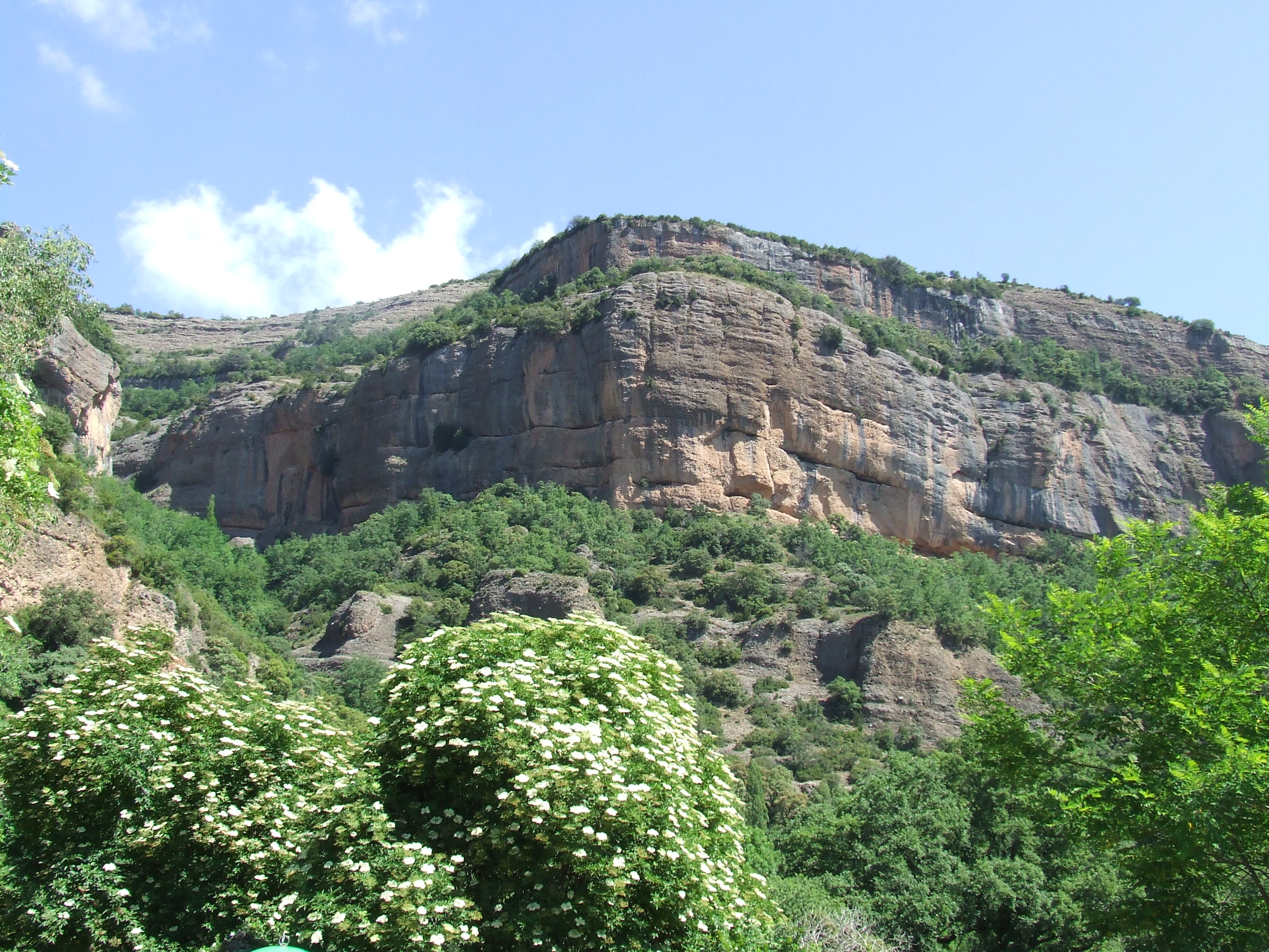 Lloc on es troba la cova d'Esplugallonga (Serradell, Toralla i Serradell, Conca de Dalt, Pallars Jussà)